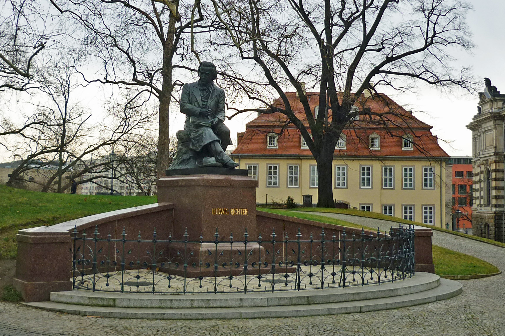 Ludwig Richter-Denkmal auf der Brühlschen Terrasse in Dresden (Neuaufstellung im Sept. 2013)